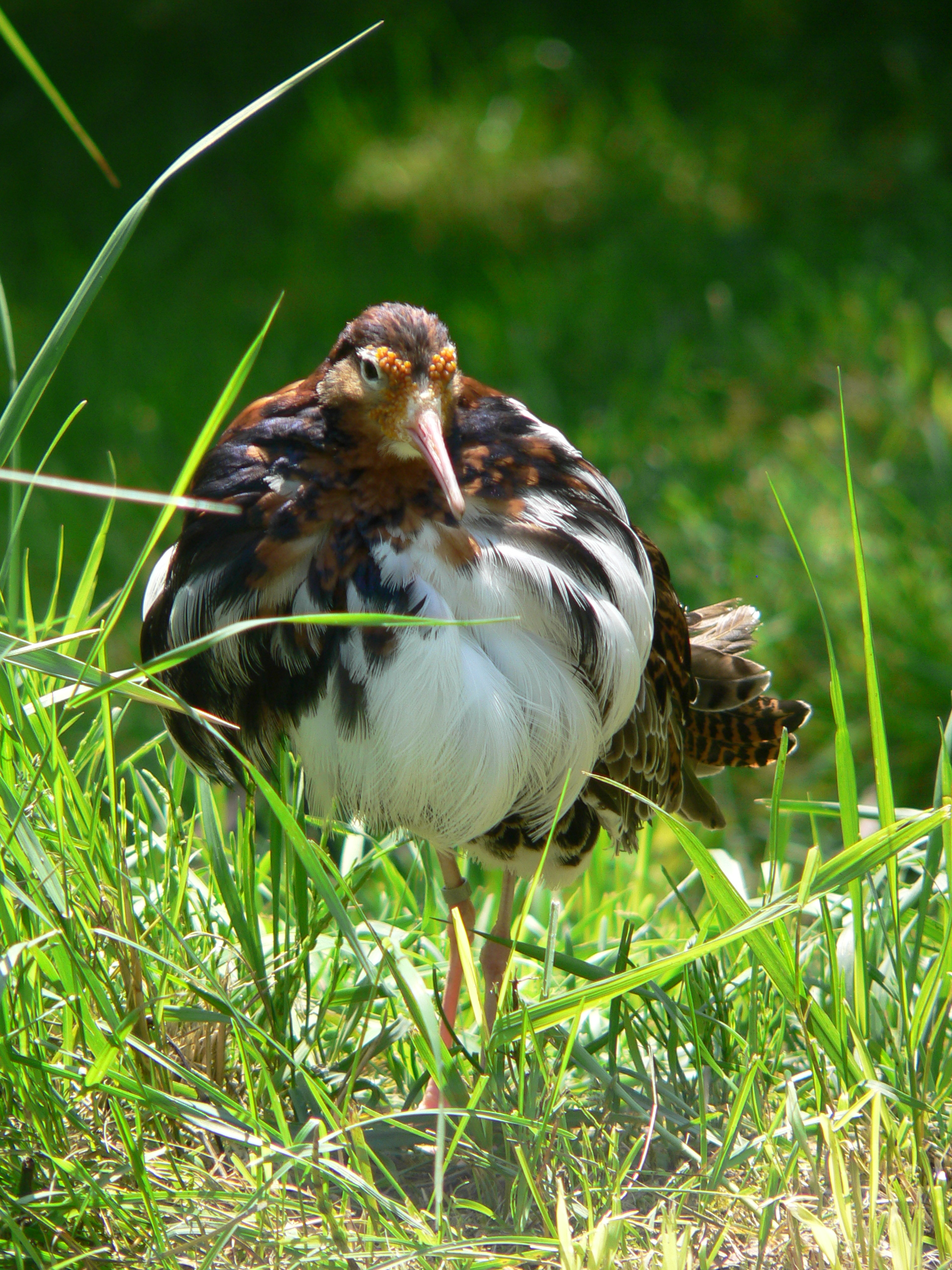 bird